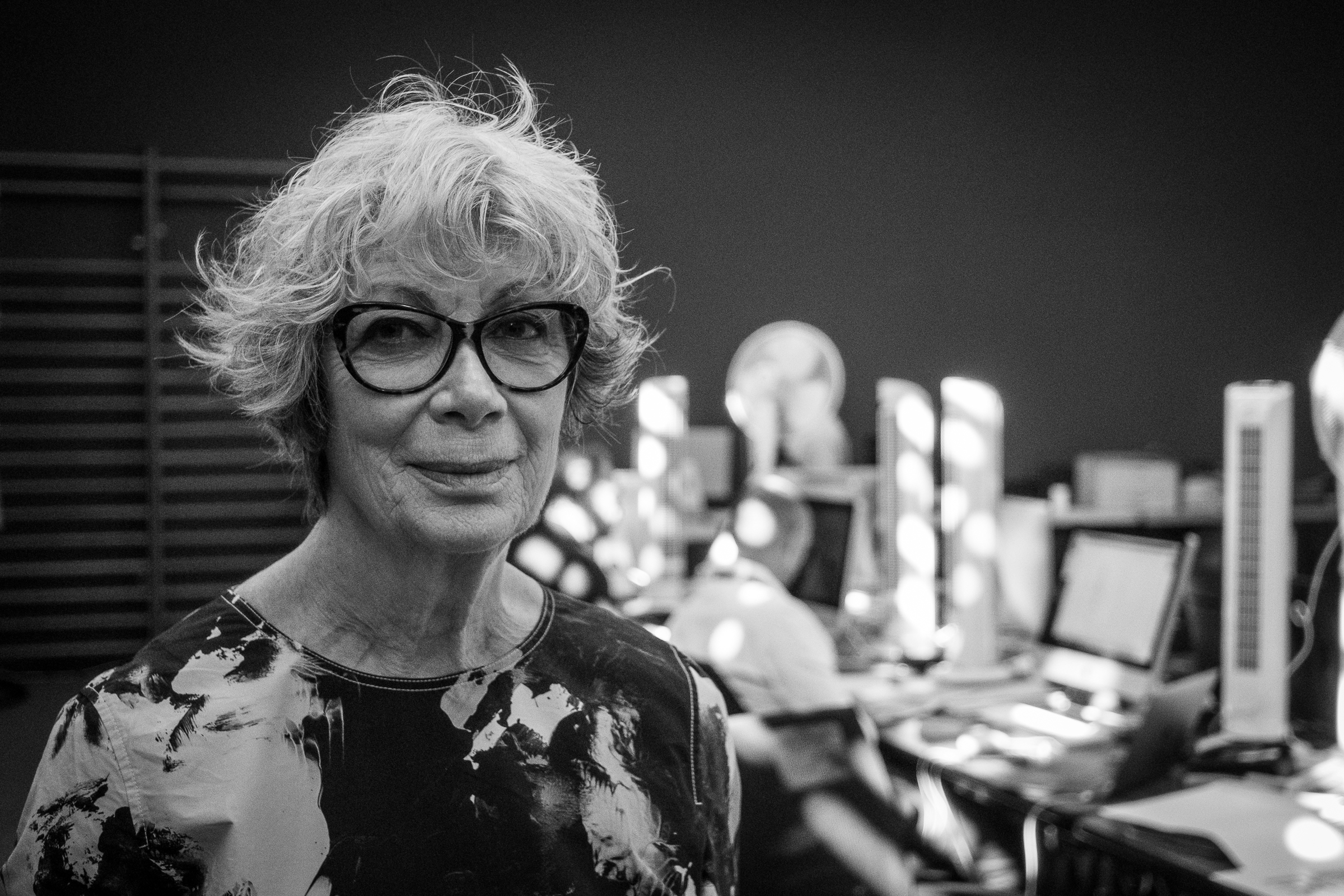 Sylvie Grumbach par Claude Truong-Ngoc en septembre 2019